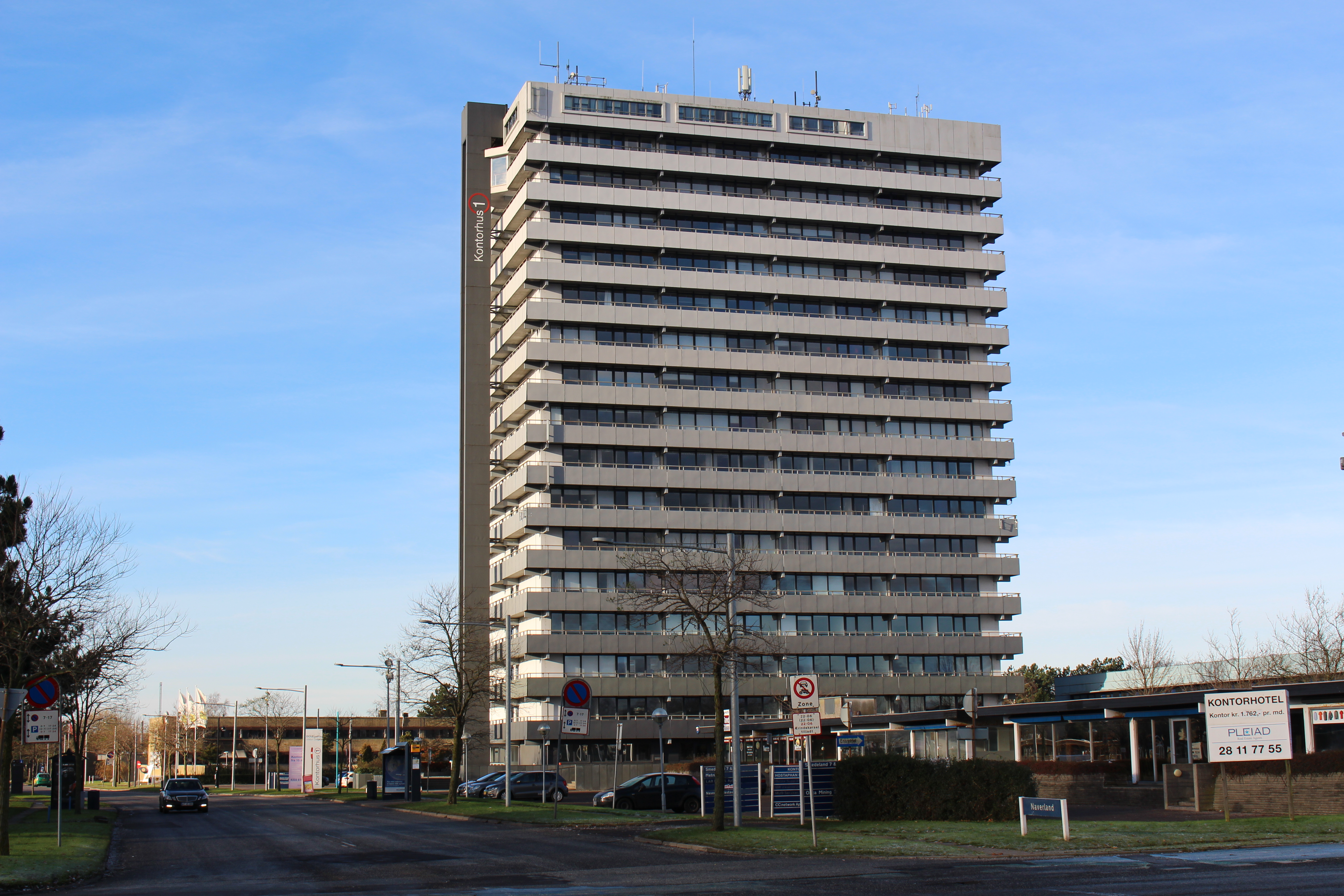 Kontorhus 1 i Hersted Industripark, Albertslund.